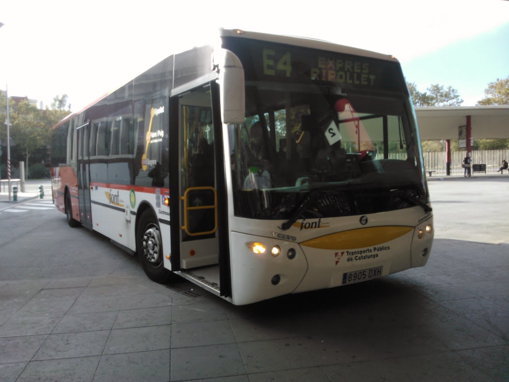 Autobús interurbà/urba a Barcelona